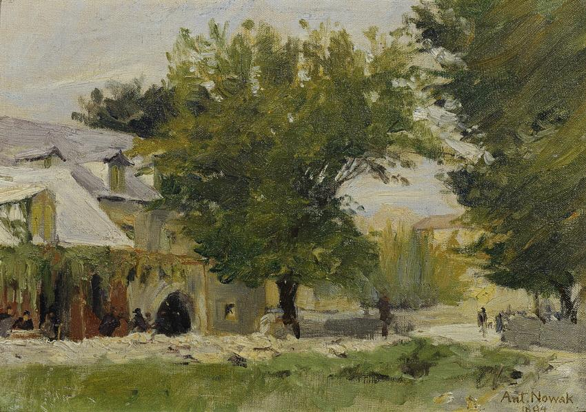 Gasthaus in Salona an der Straße nach Glisse